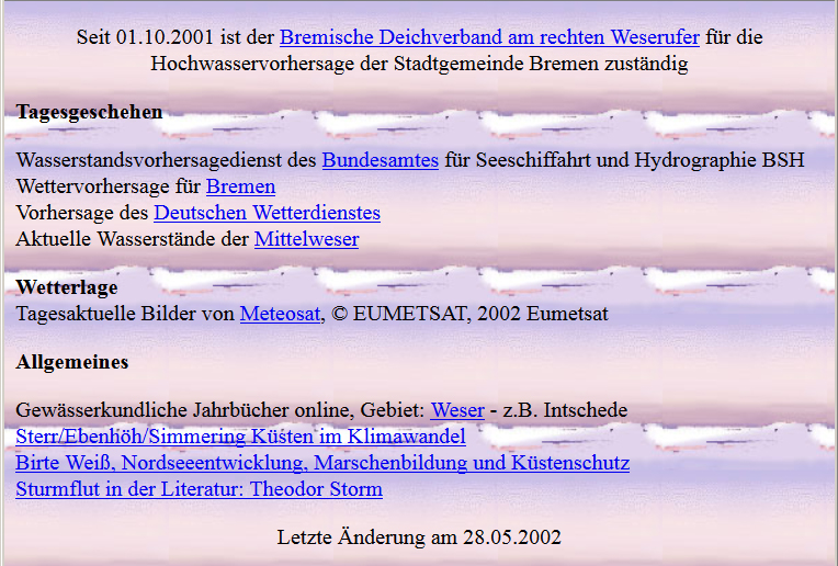 Bild aus dem Bremer Umwelt-Informationssystem